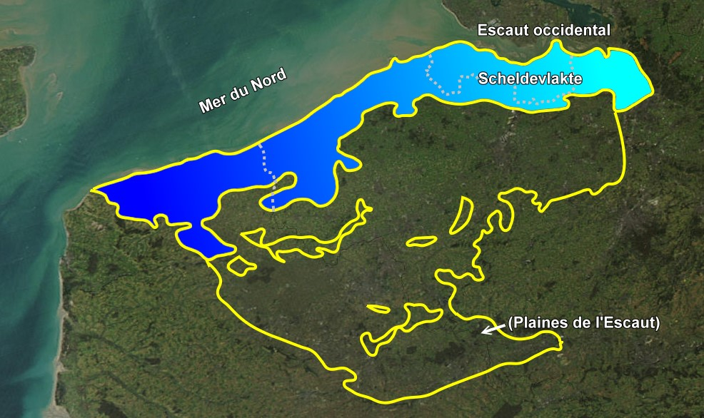 Scheldevlakte ("Plaine de l'Escaut"), en bleu clair, le long de l'Escaut occidental et son homonyme "Plaines de l'Escaut" dans le Tournaisis